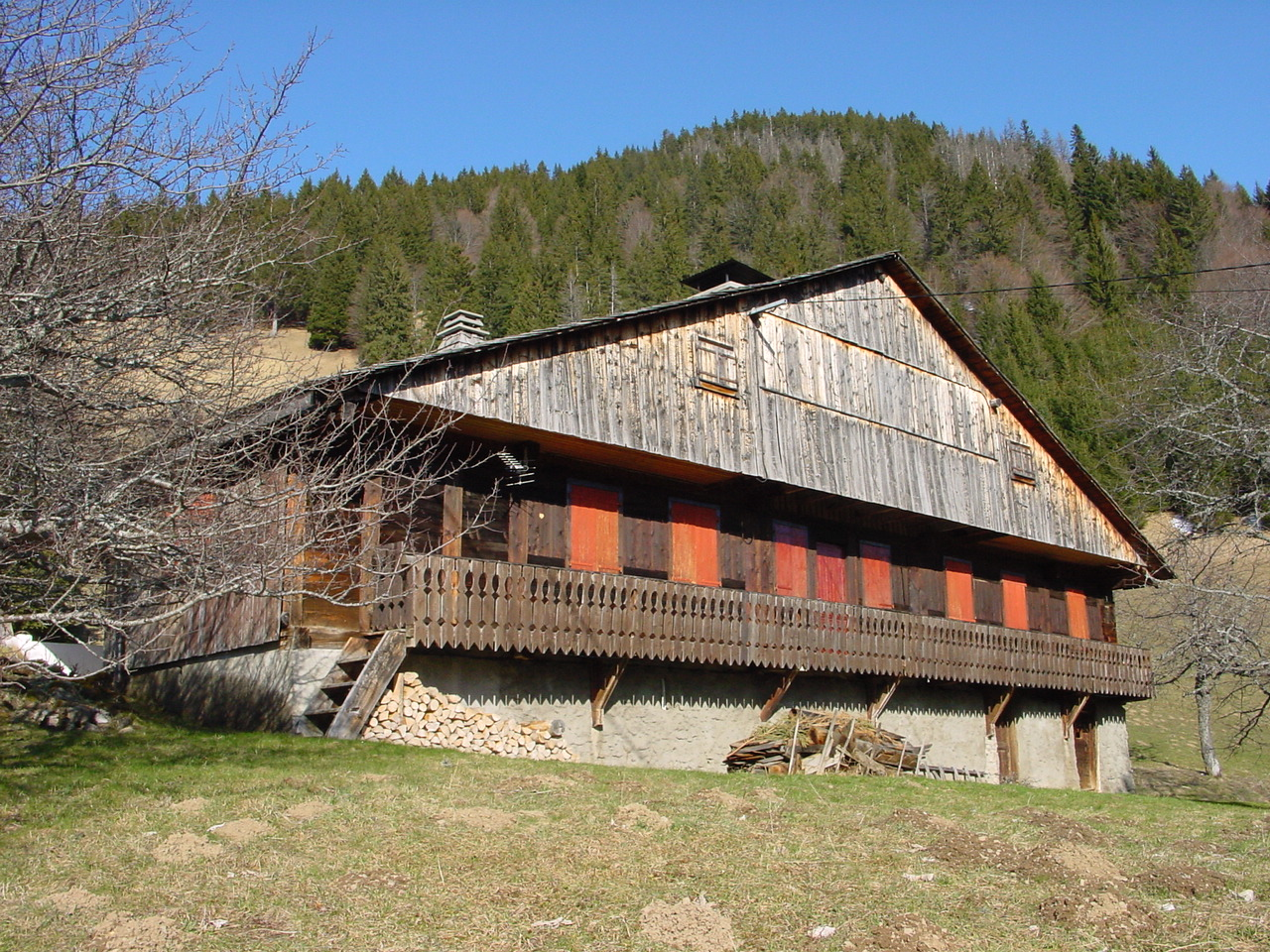 Chalet traditionnel, vallée d'Abondance (France)